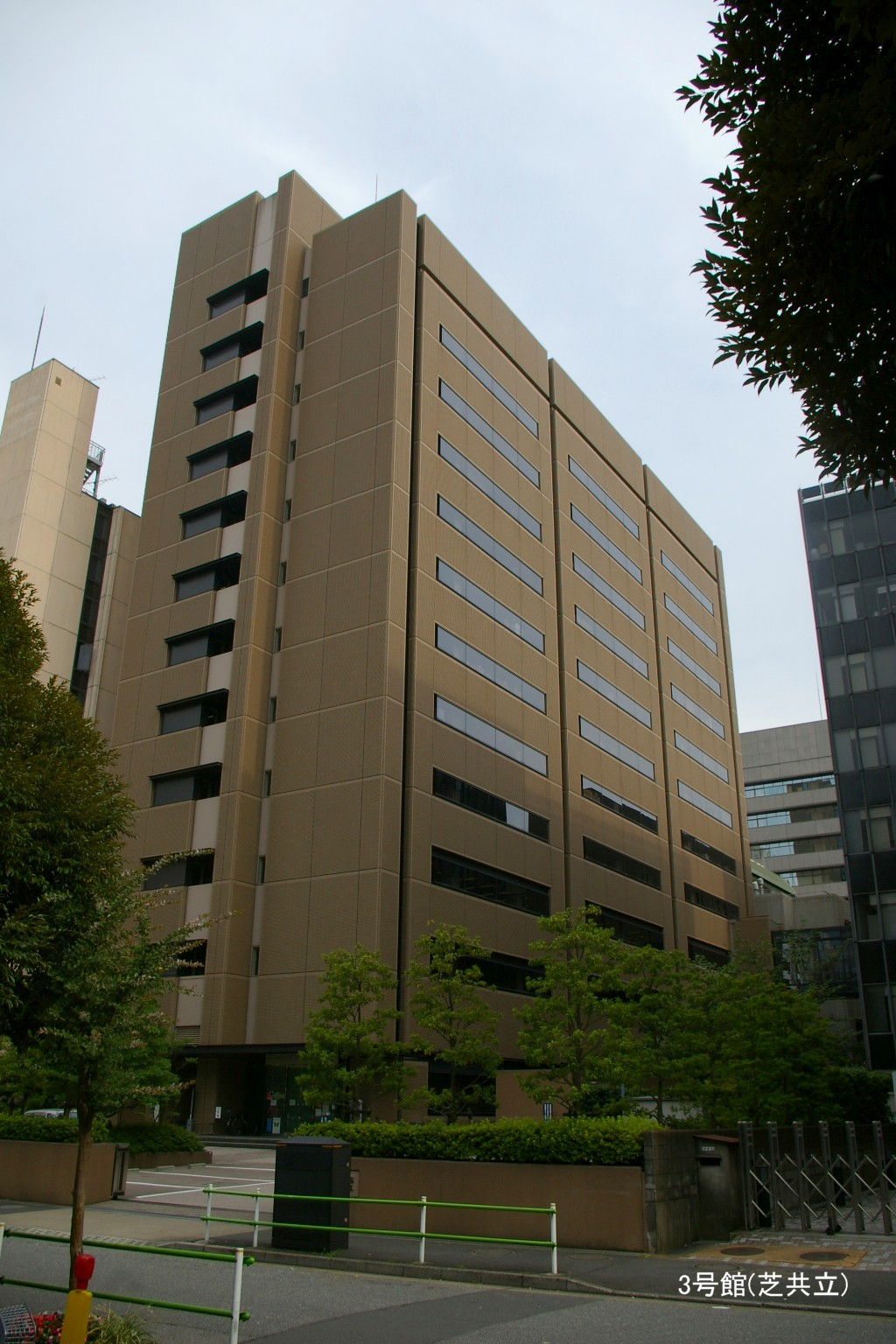 2009.2東京都内で塾生 (talk)が撮影。